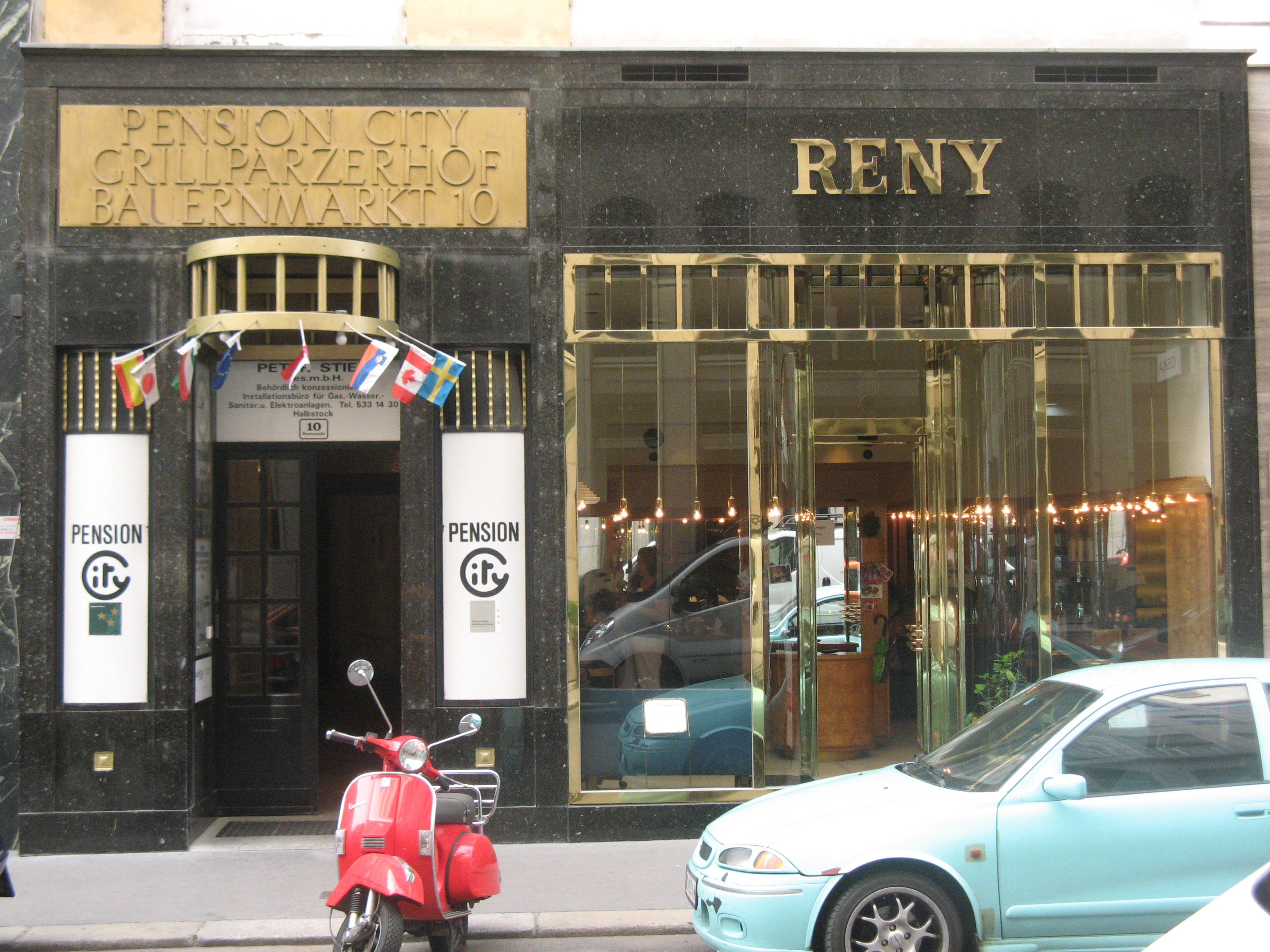 Damenfriseur Reny, Fassade 1912 von Arthur Baron, Bauernmarkt 10, Wien-Innere Stadt